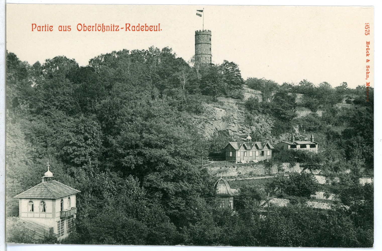 Radebeul; Oberlößnitz This postcard is from publisher Brück & Sohn in Meißen ( postcard has a unique number 09575 and is available in a higher resolution at the publisher. This images was uploaded in a cooperation project between Wikipedians and the publisher.